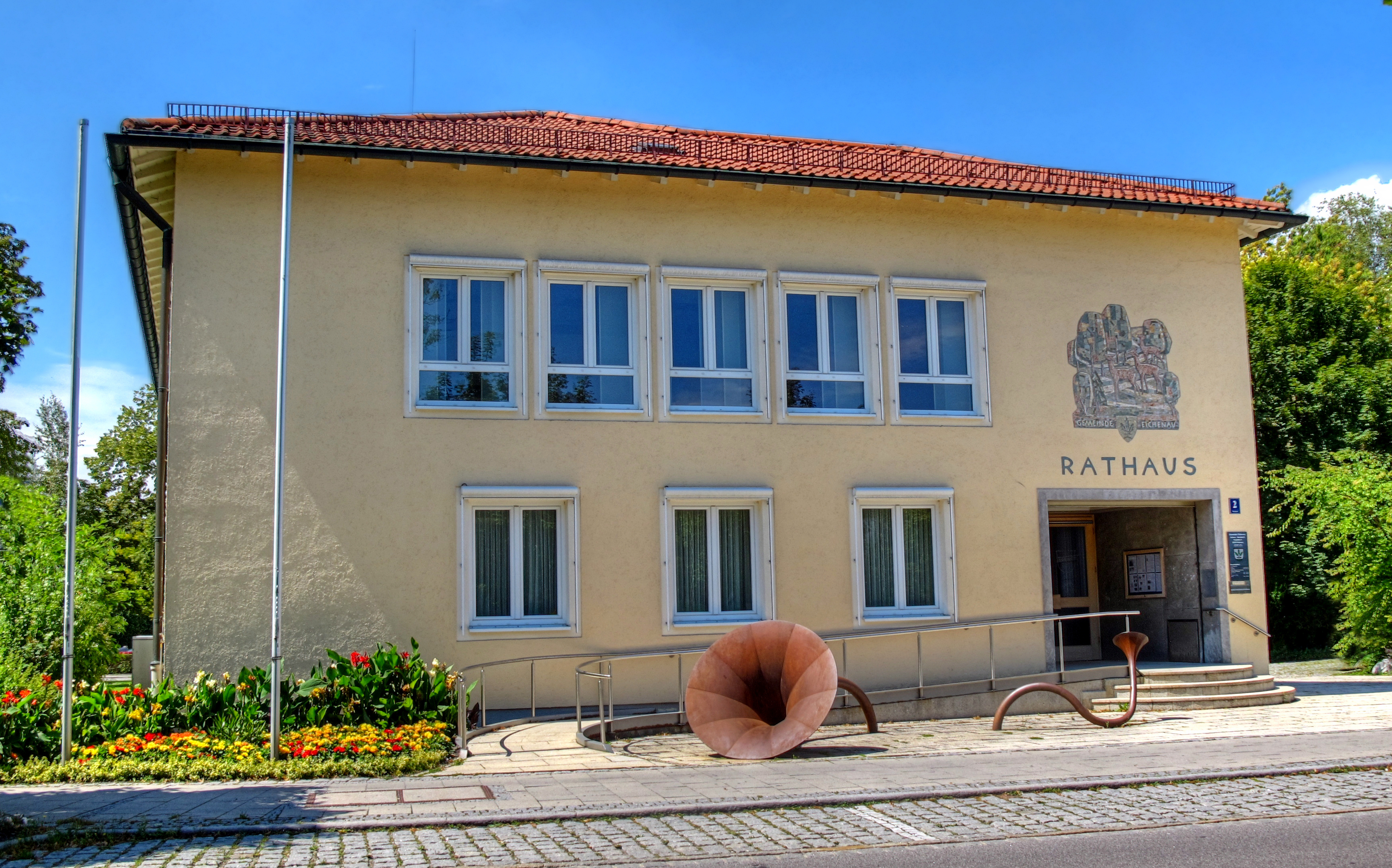 Deutschland, Bayern, Landkreis Fürstenfeldbruck, Eichenau, Rathaus